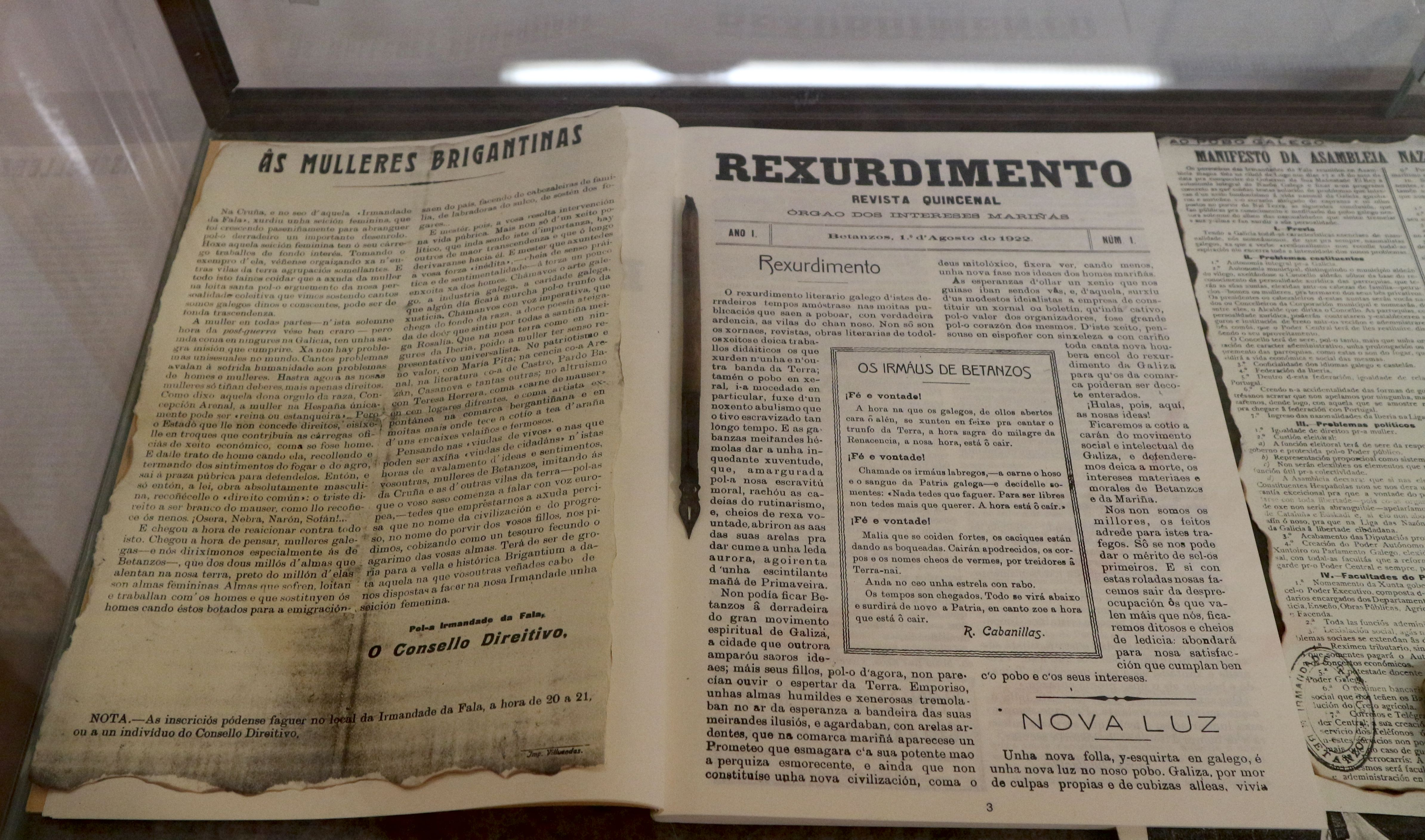 Revista "Rexurdimento" de Betanzos. Museo das Mariñas e antigo mosteiro de Santo Domingo, Betanzos. Segundo andar, "Símbolos de España e a Galiza".